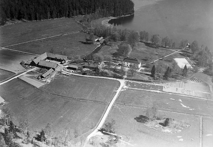 Flygfoto över Molnsättra herrgård med ekonomibyggnader.